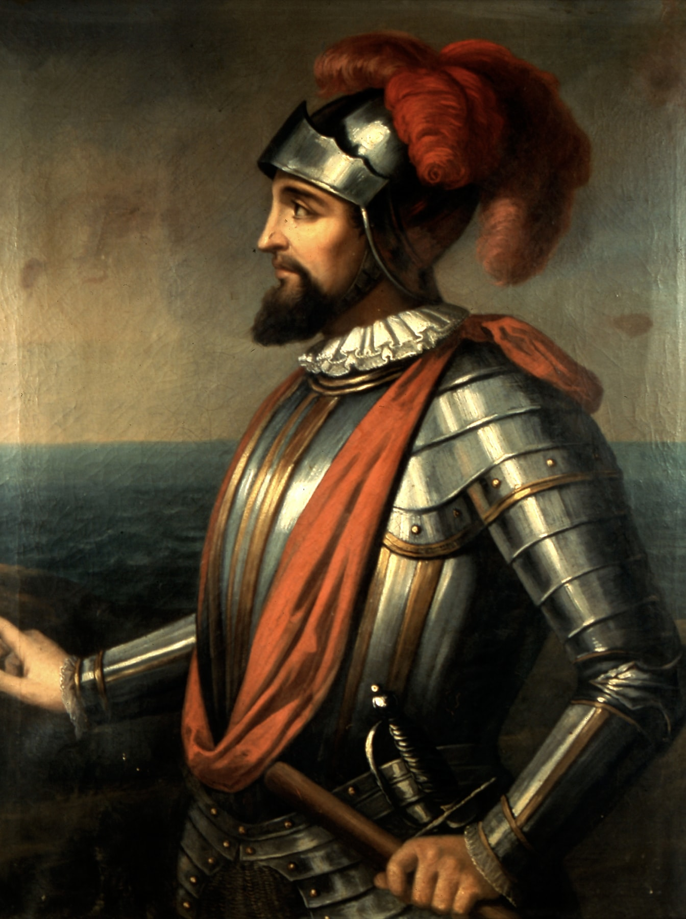 Copiado del grabado de la obra Retratos de Españoles ilustres, publicada en Madrid, en 1791.